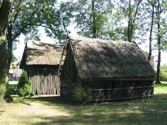 Fischerhütten am Gröbener Kietz, Brandenburg Selbst fotografiert August 2004 GNU FDL